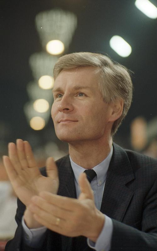 30.8.-2.9.1988 SPD-Parteitag in Münster, Halle Münsterland